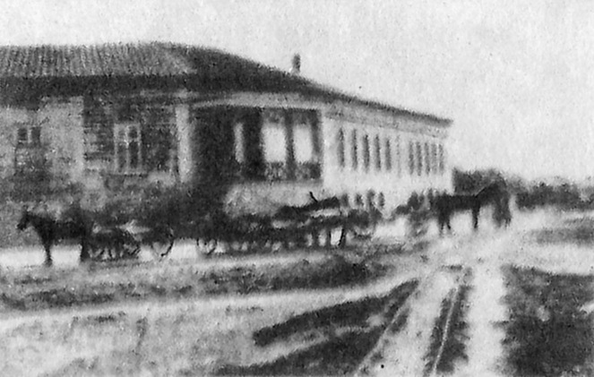 Грязелечебница "Мойнаки". Конец XIX в.